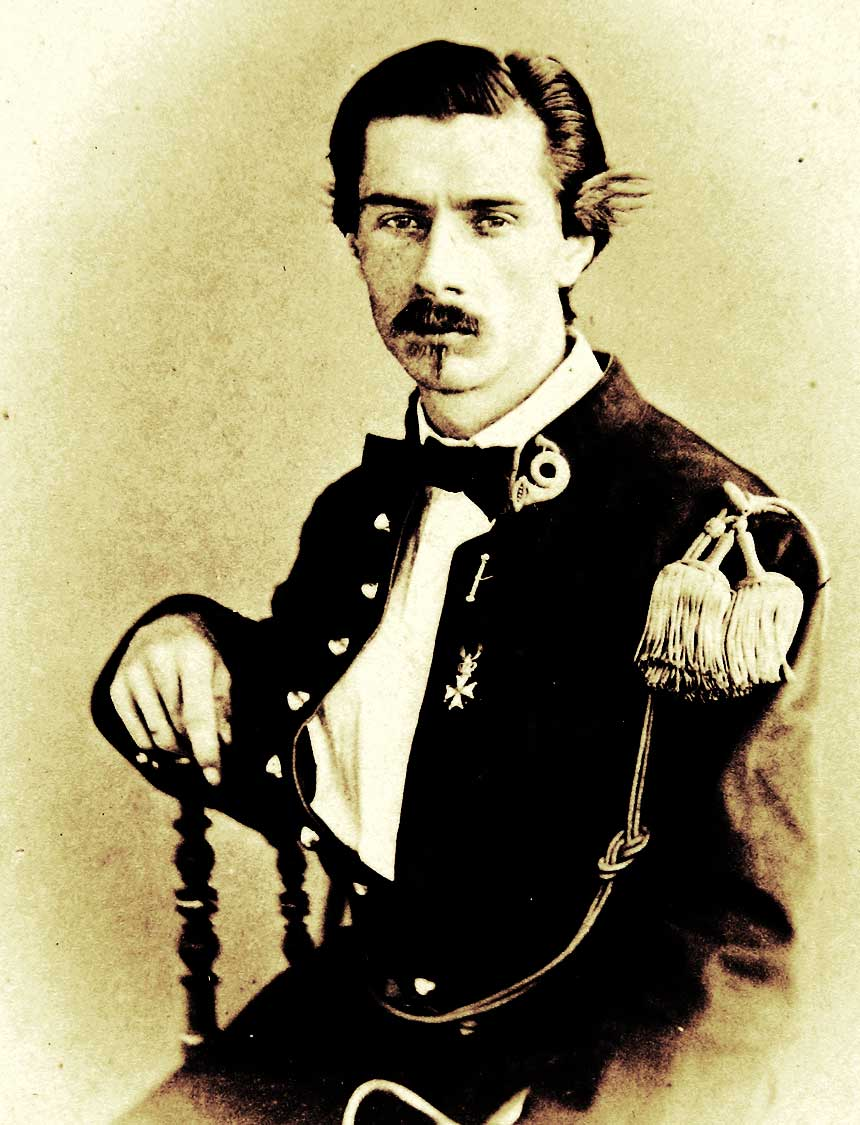 JJWE Verstege